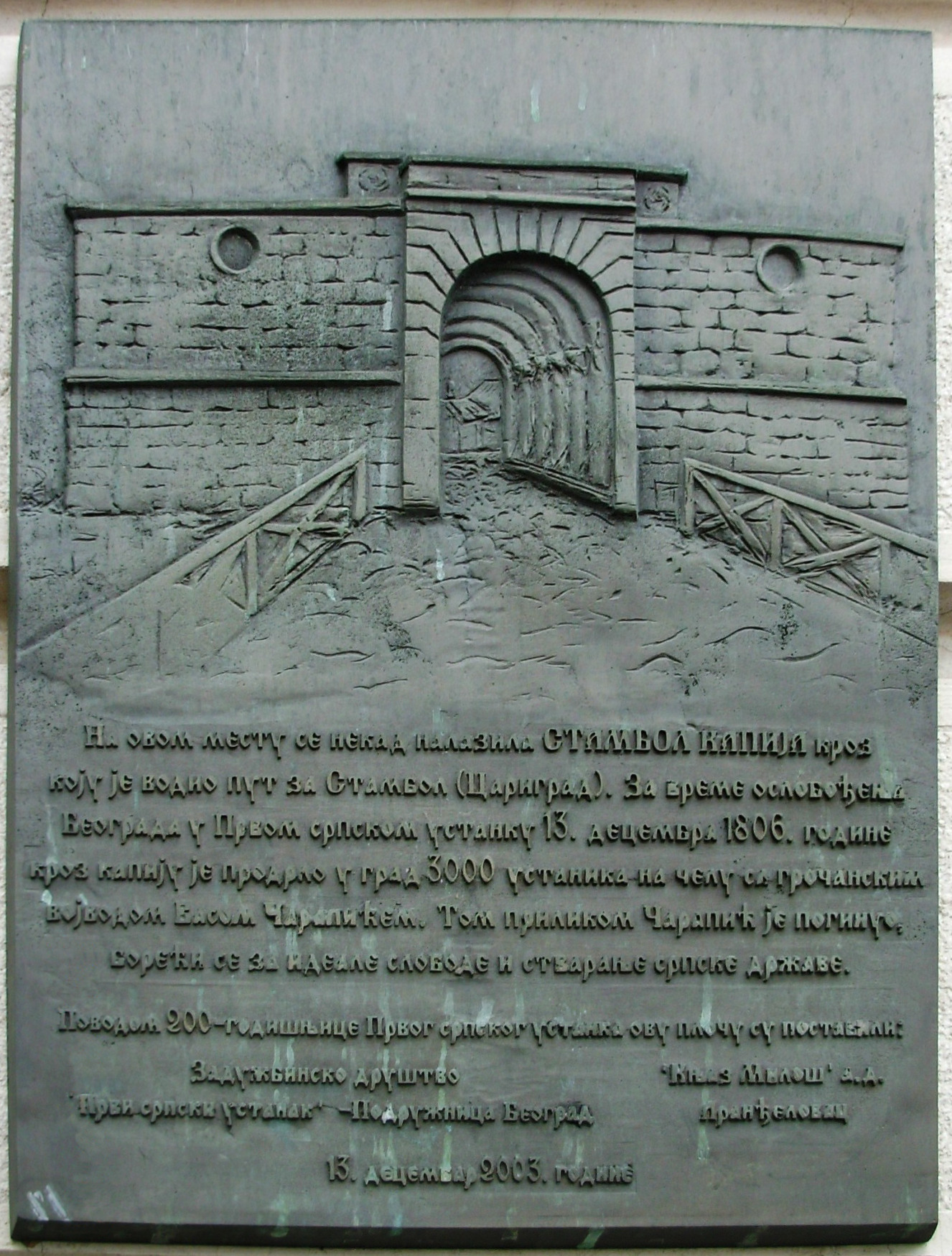 Tabla na zidu Narodnog pozorišta u Beogradu, na mestu bivše Stambol kapije. Slikao Goldfinger